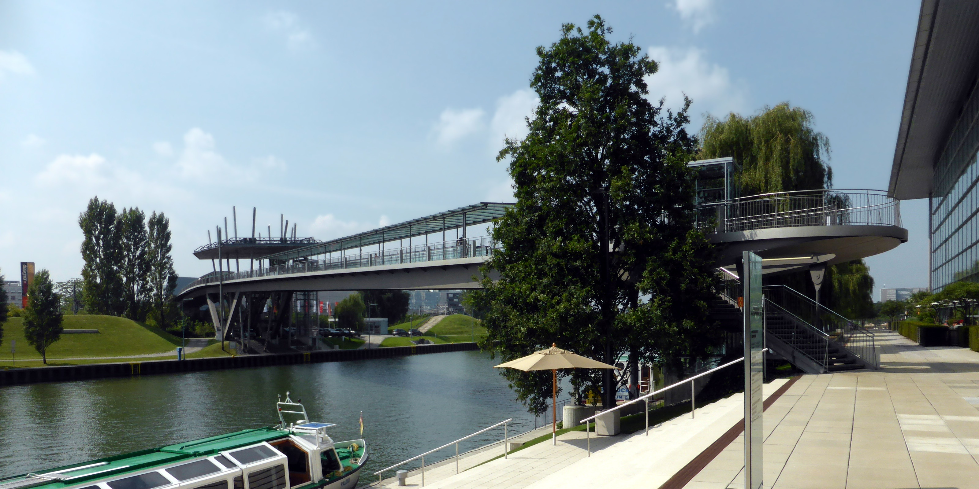 Die Wolfsburger Stadtbrücke über den Mittellandkanal, vom Nordufer aus gesehen.